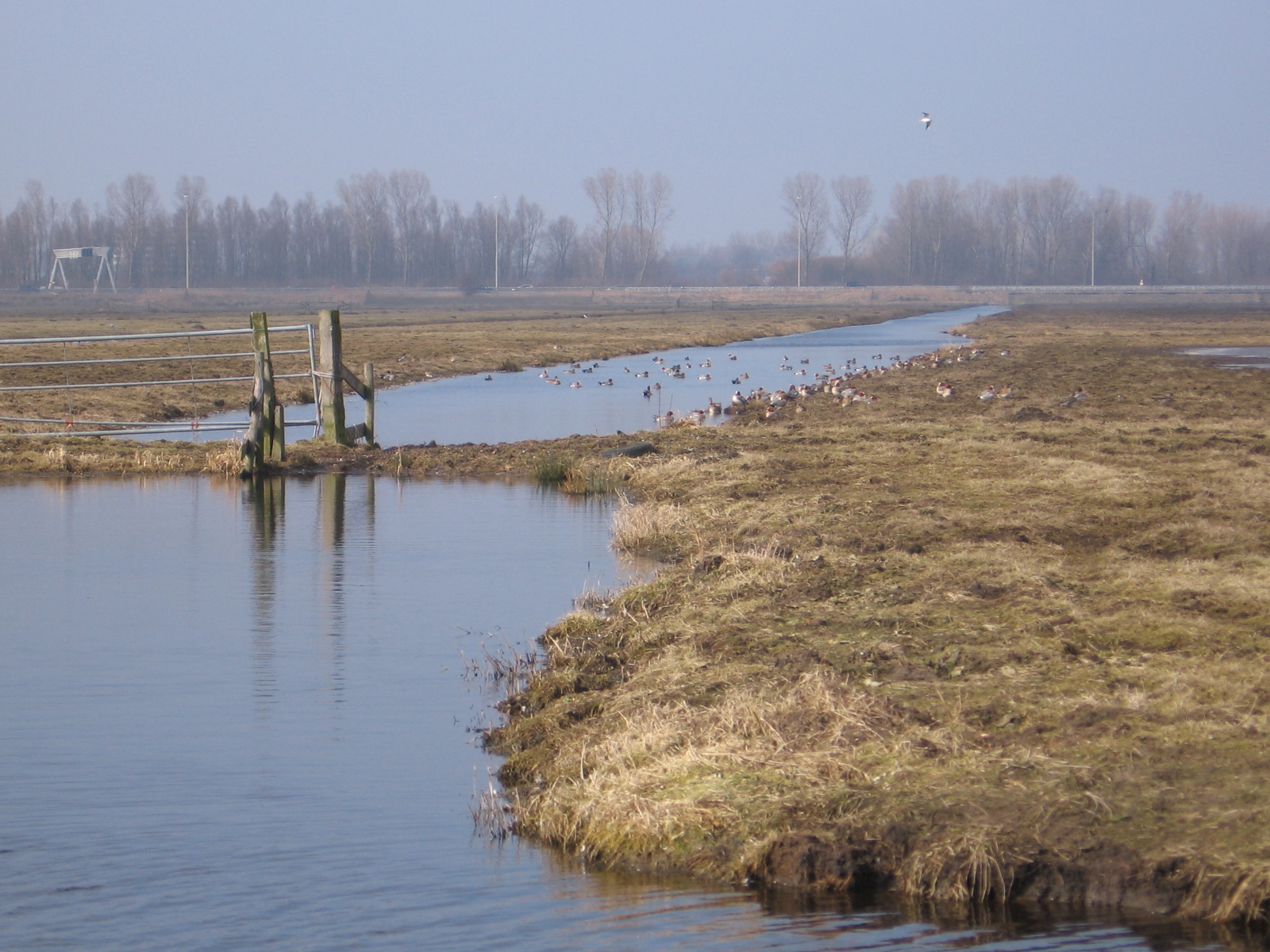 Zoeterwoude and surroundings